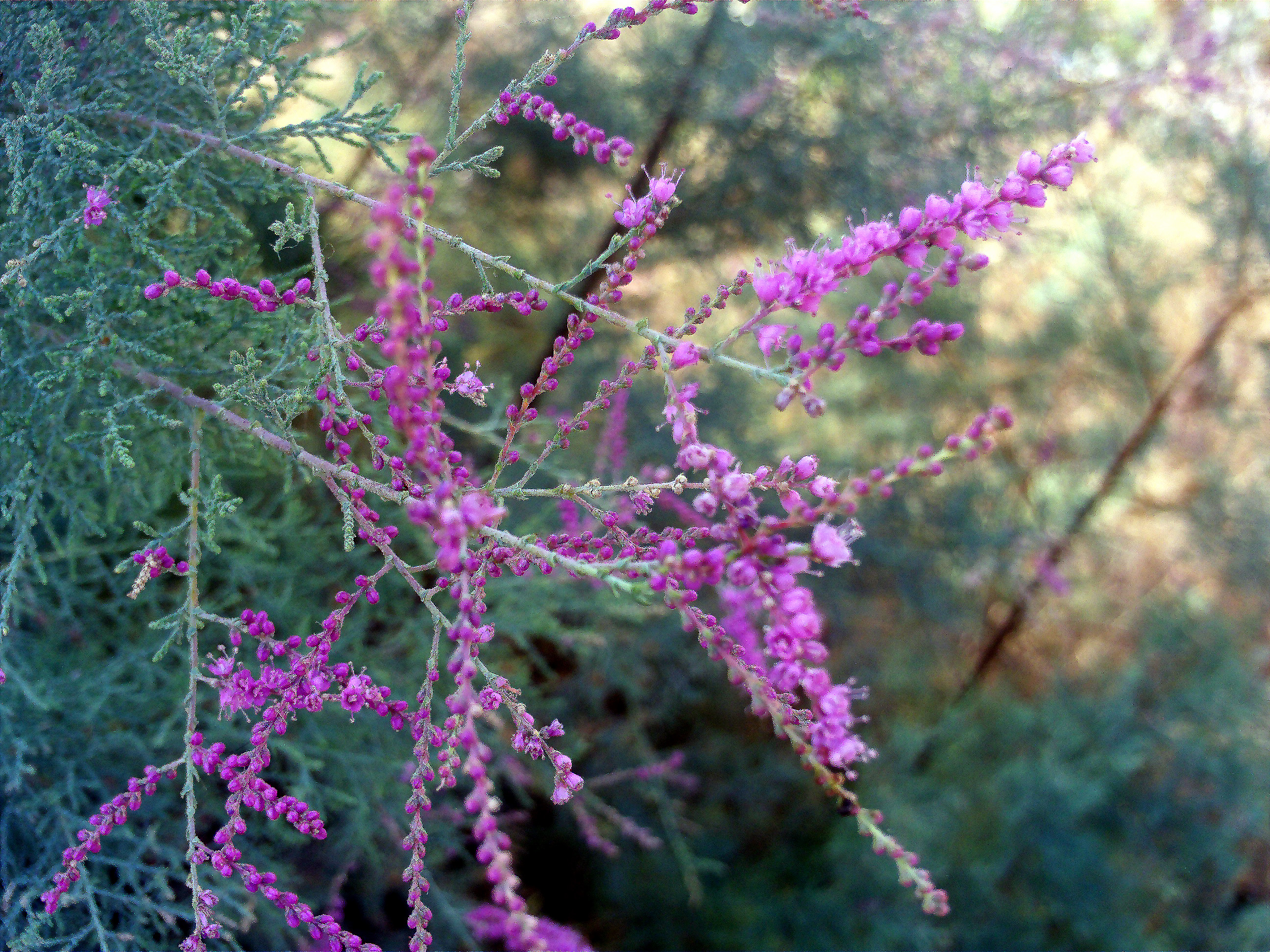 Tamarix tetrandra flowers close up, Parque de las Dunas de Torrelamata, Torrelamata, Torrevieja, Alicante, Spain